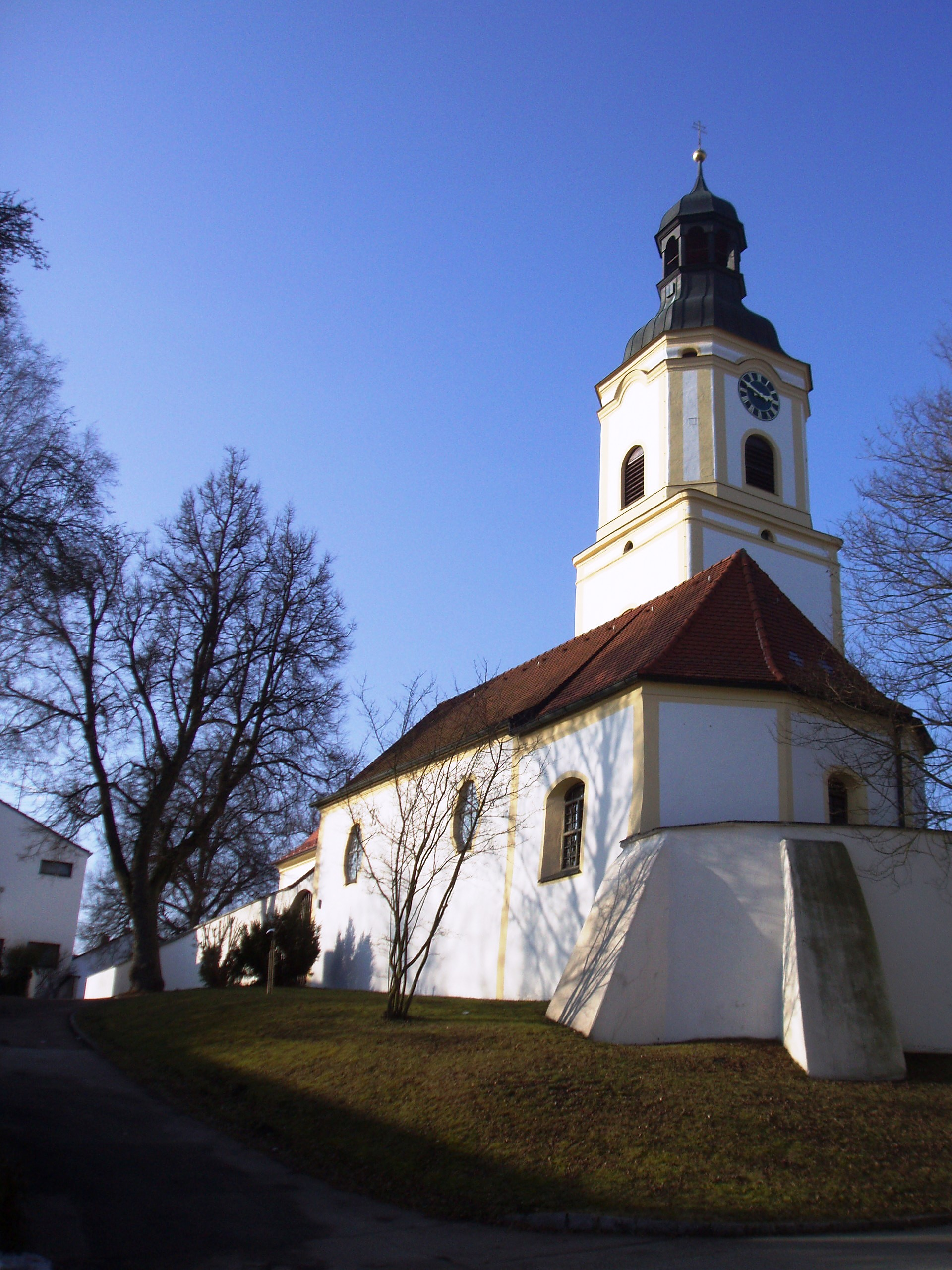 Kirche St. Mauritius in Bergheim, Landkreis Neuburg-Schrobenhausen